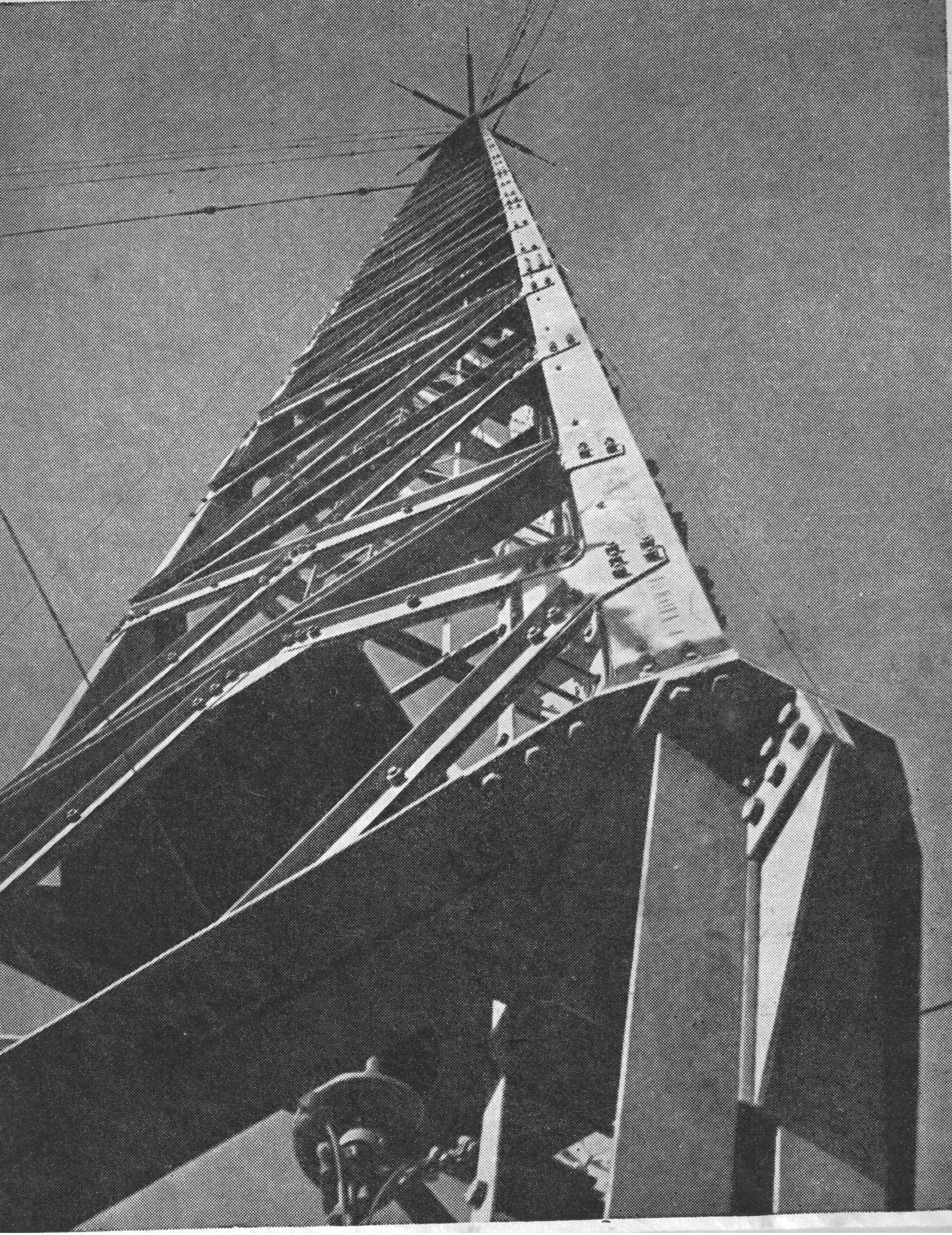 תורן האנטנה של תחנת השידור ברמאללה ששידרה את "קול ירושלים". גובהו 225 מ'. פורסם בחוברת "הגלגל" בתאריך 11.10.1945.